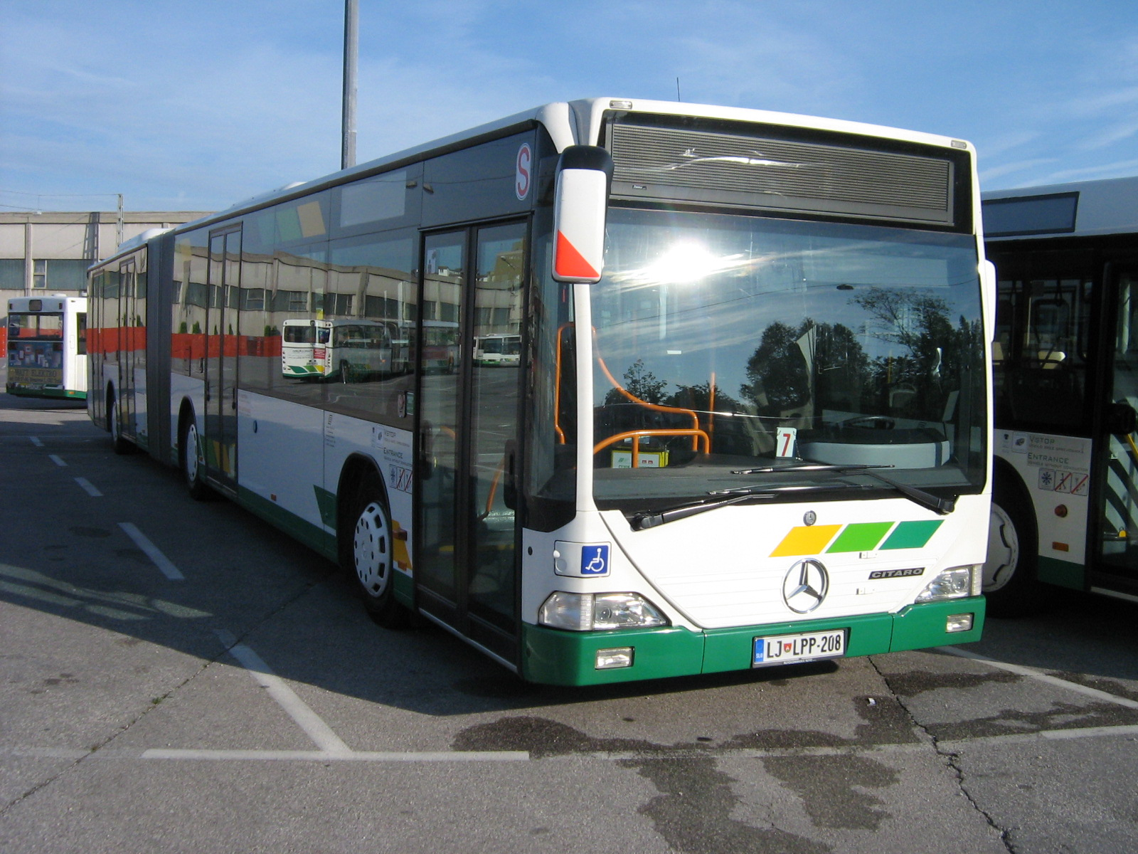 Avtobus Mercedes-Benz Citaro G (O530G) v lasti Ljubljanskega potniškega prometa. Avtor: Uporabnik:BurekBuster